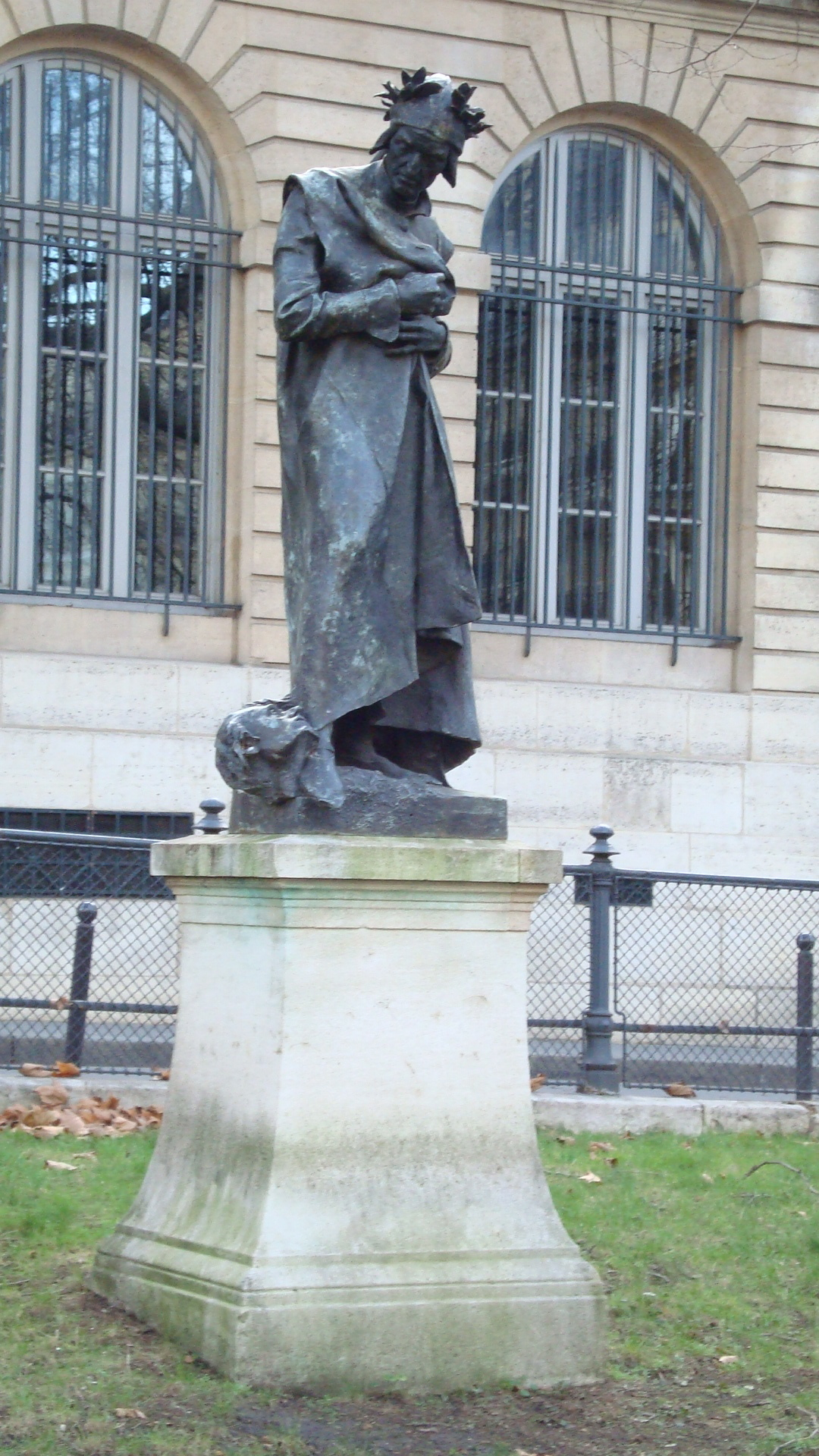 Statue de Dante située rue des Écoles à Paris, devant le Collège de France